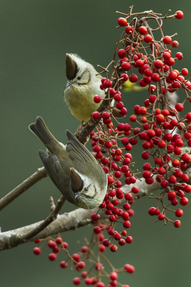 Taiwan Yuhina - Taiwan_S4E8280